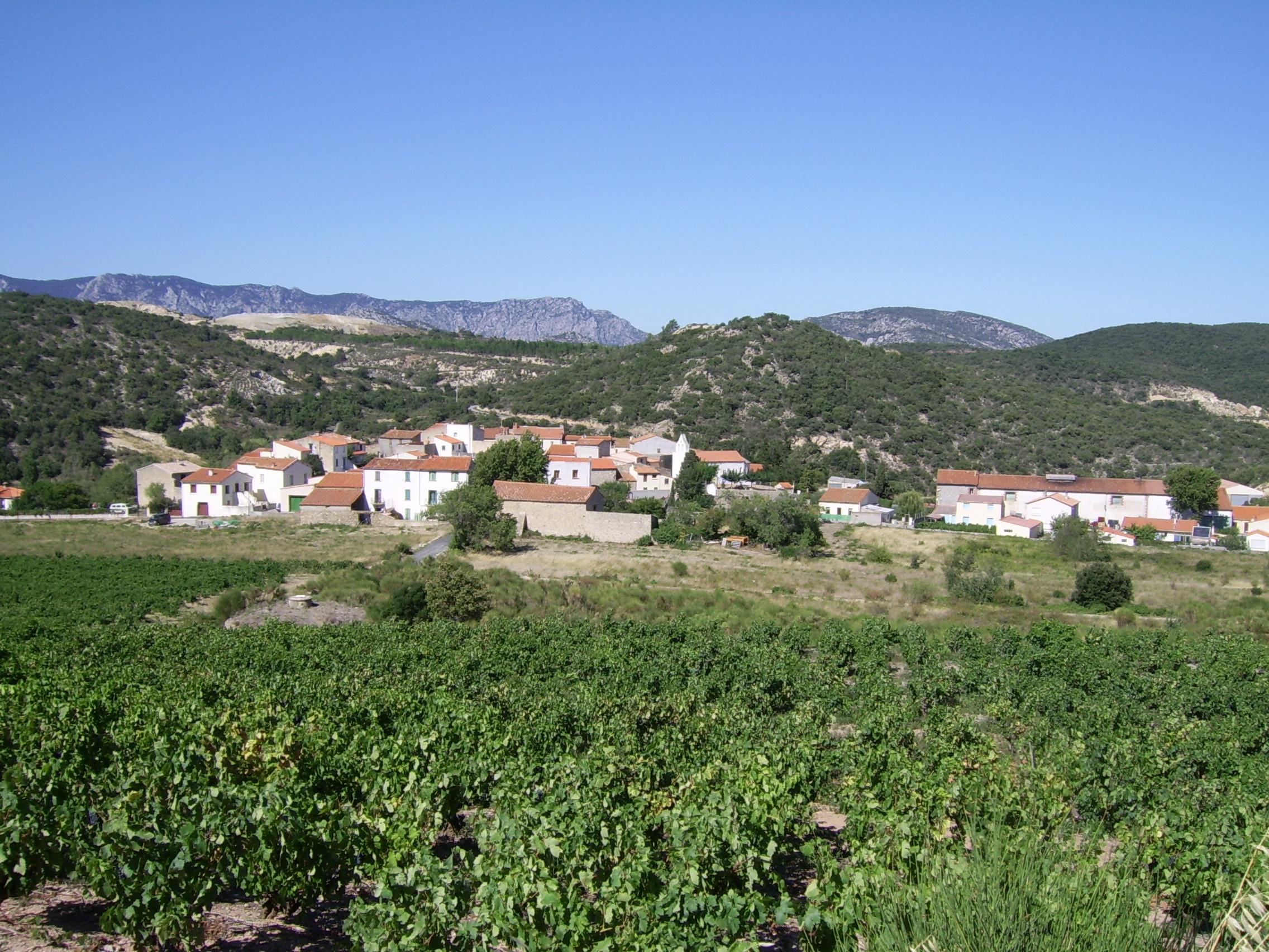 Village de Lansac (Pyrénées-Orientales)